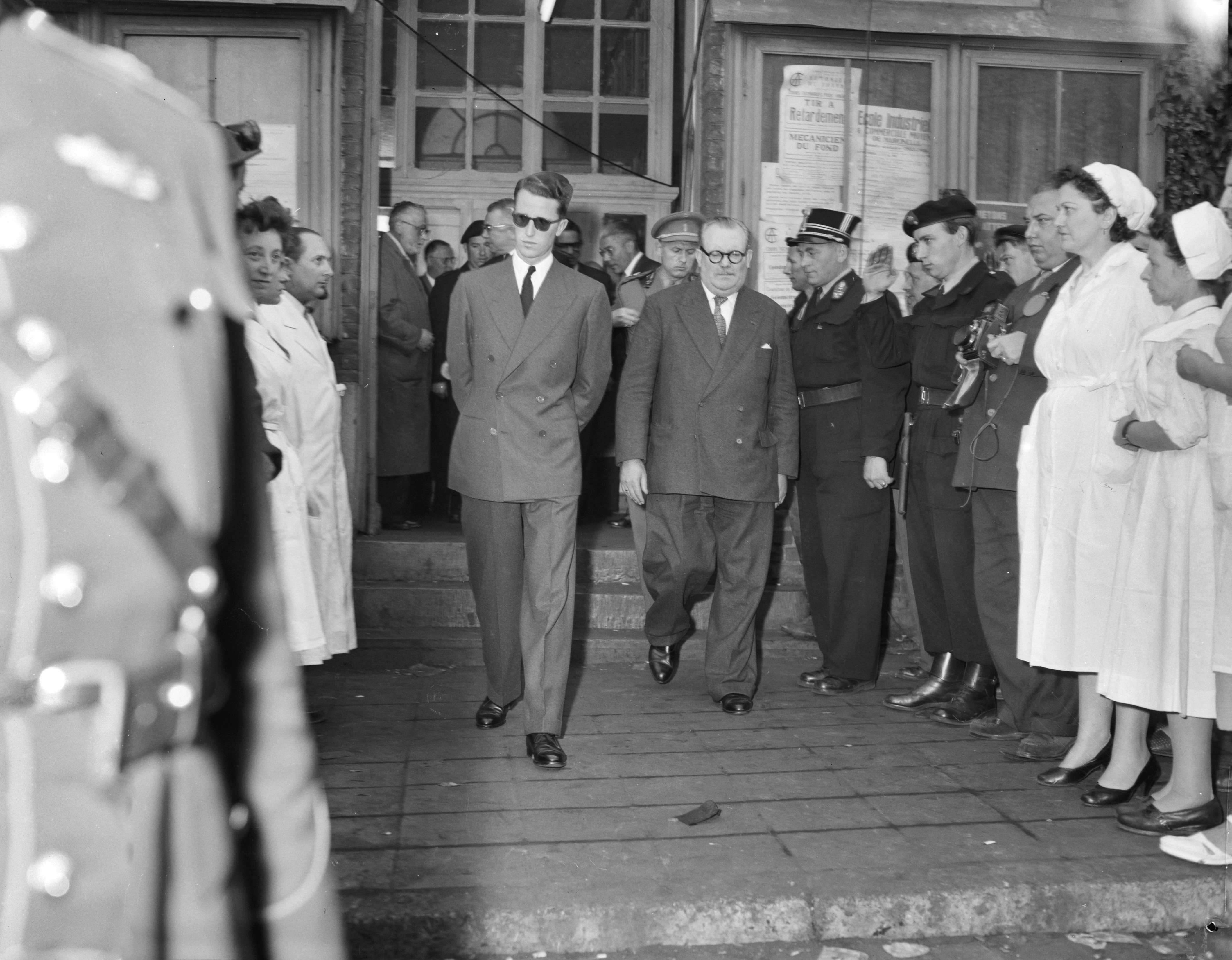 Collectie / Archief : Fotocollectie Anefo Reportage / Serie : [ onbekend ] Beschrijving : Mijnramp Bois du Caizier, Marcinelle in België. Koning Boudewijn en minister Van Acker Datum : 9 augustus 1956 Locatie : België, Marcinelle Trefwoorden : koningen, mijnbouw, mijnen, ministers, rampen Persoonsnaam : Boudewijn, koning van België Fotograaf : Rossem, Wim van / Anefo Auteursrechthebbende : Nationaal Archief Materiaalsoort : Negatief (zwart/wit) Nummer archiefinventaris : bekijk toegang 2.24.01.04 Bestanddeelnummer : 907-9406